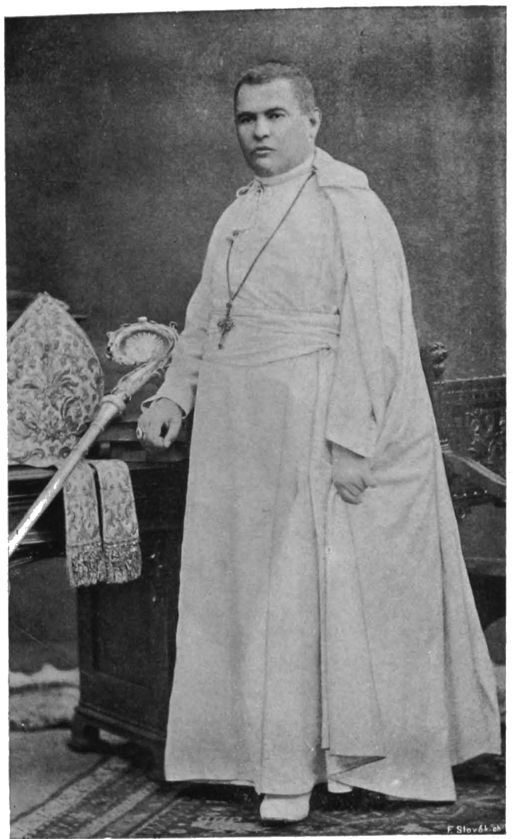 Norbert Drápalík, opat kláštera v Nové Říši